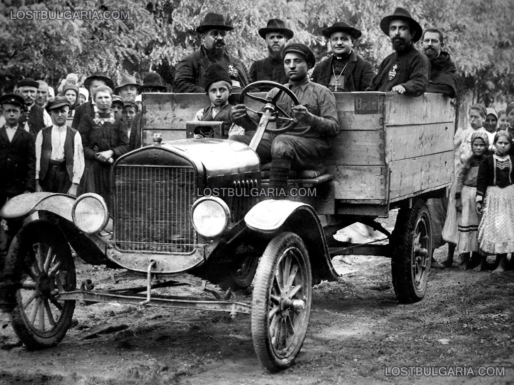 Kардинал Ронкали пристигащ с автомобил в село Бърдарски геран